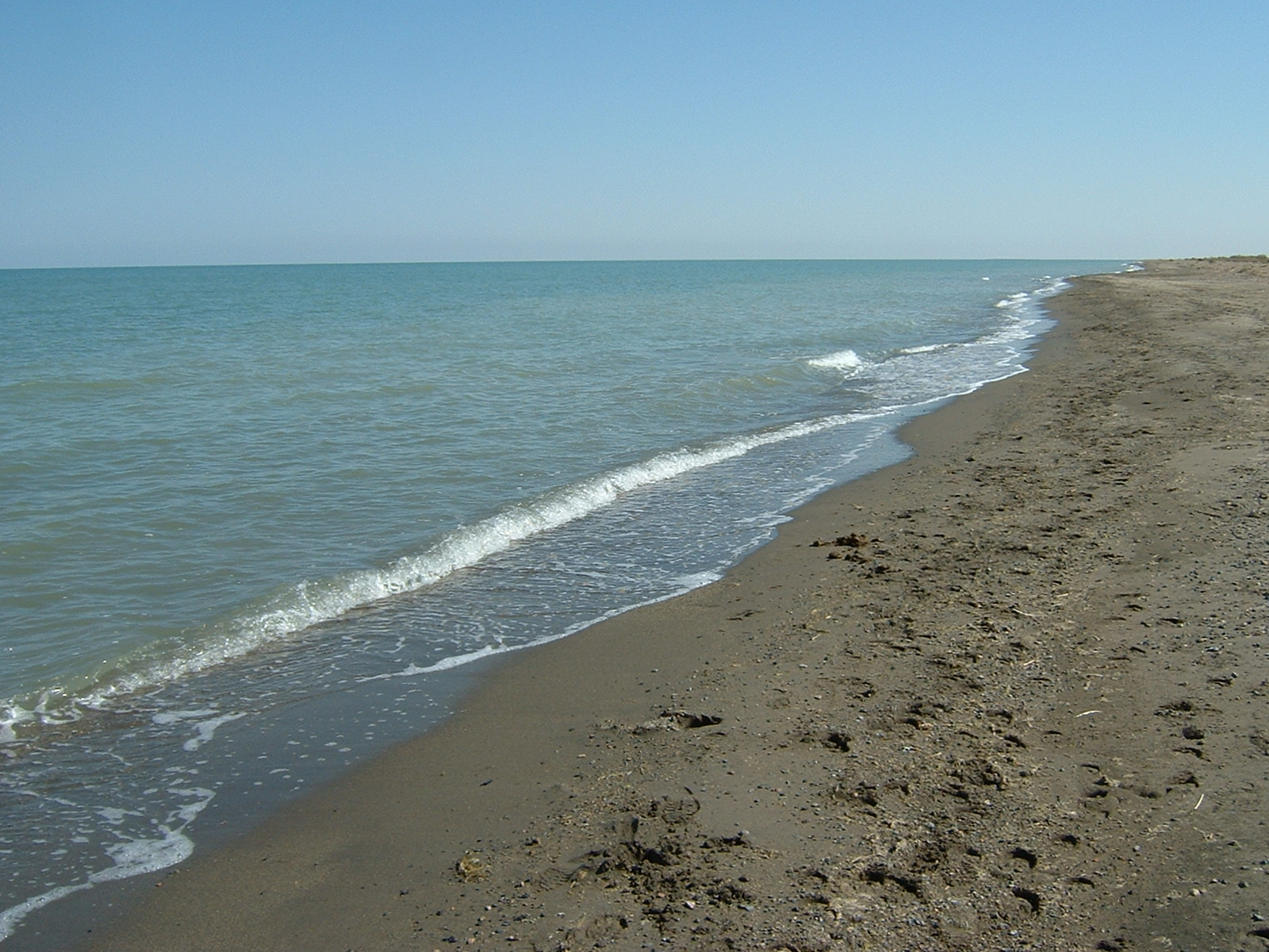 mongolské jezero Uvs núr